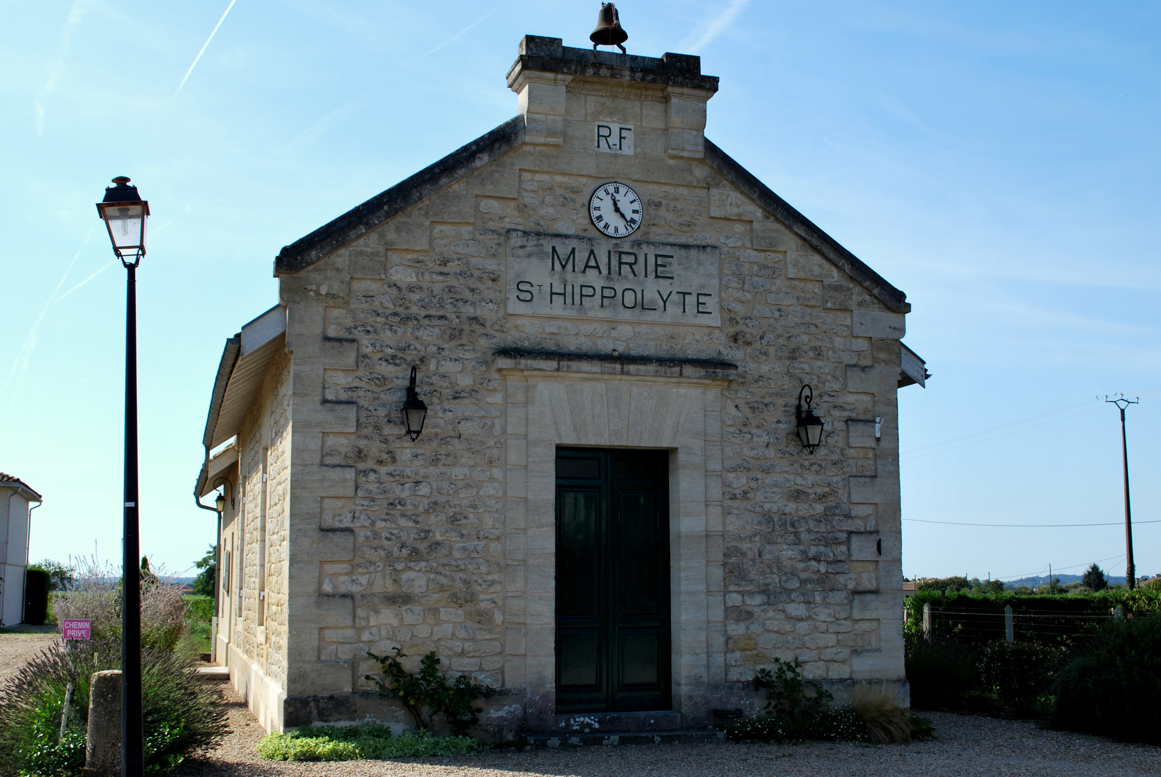 Saint-Hippolyte (Gironde) Mairie